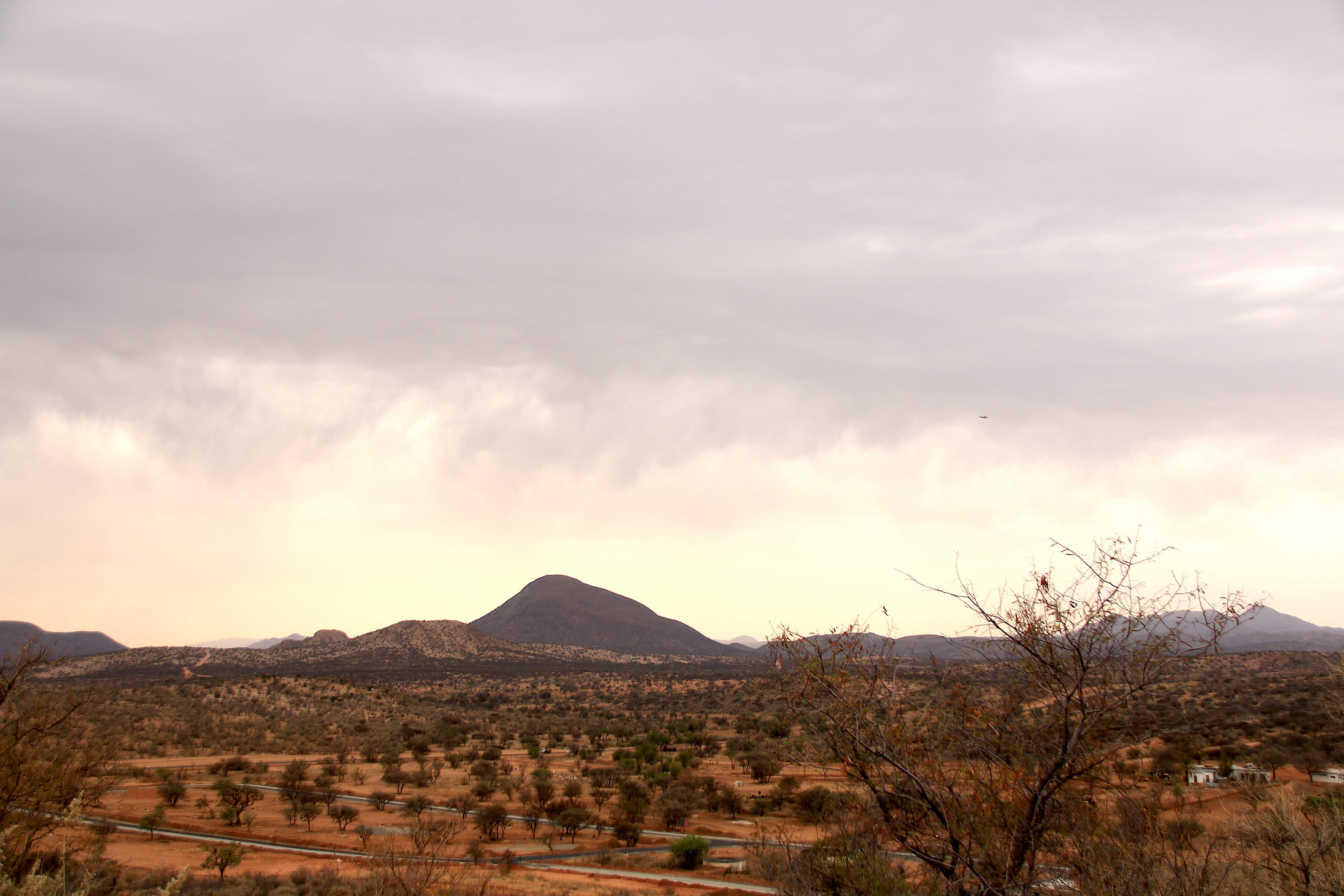 Schildkröte-Berg Namibia